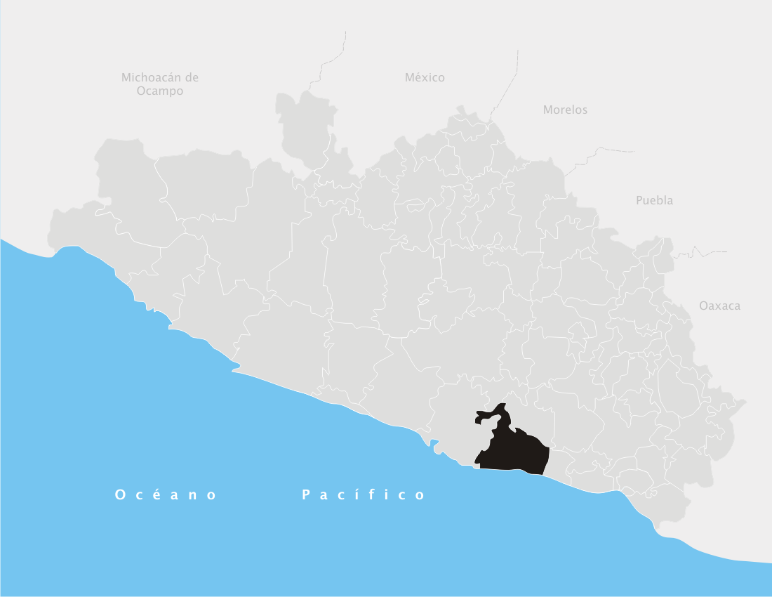 San Marcos en el estado de Guerrero (México)